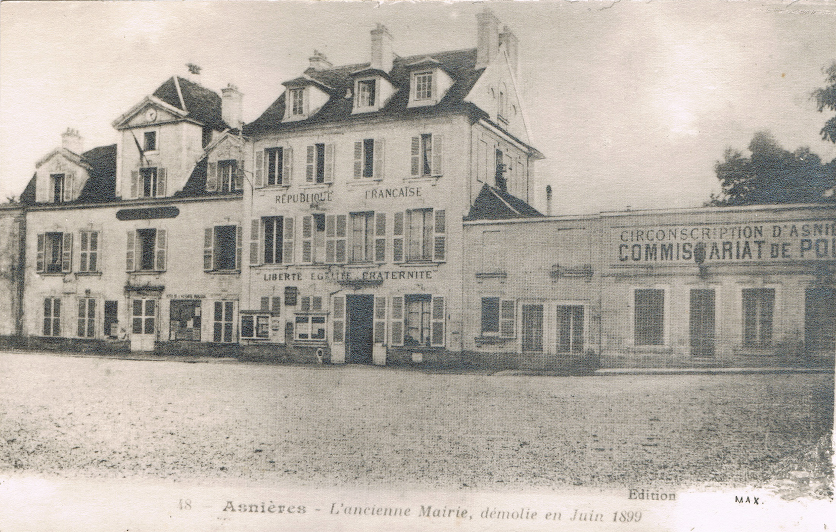 Ancienne Mairie d'Asnières, carte adressée par le maire Gatefait à Lucien Rapeaud en 1941